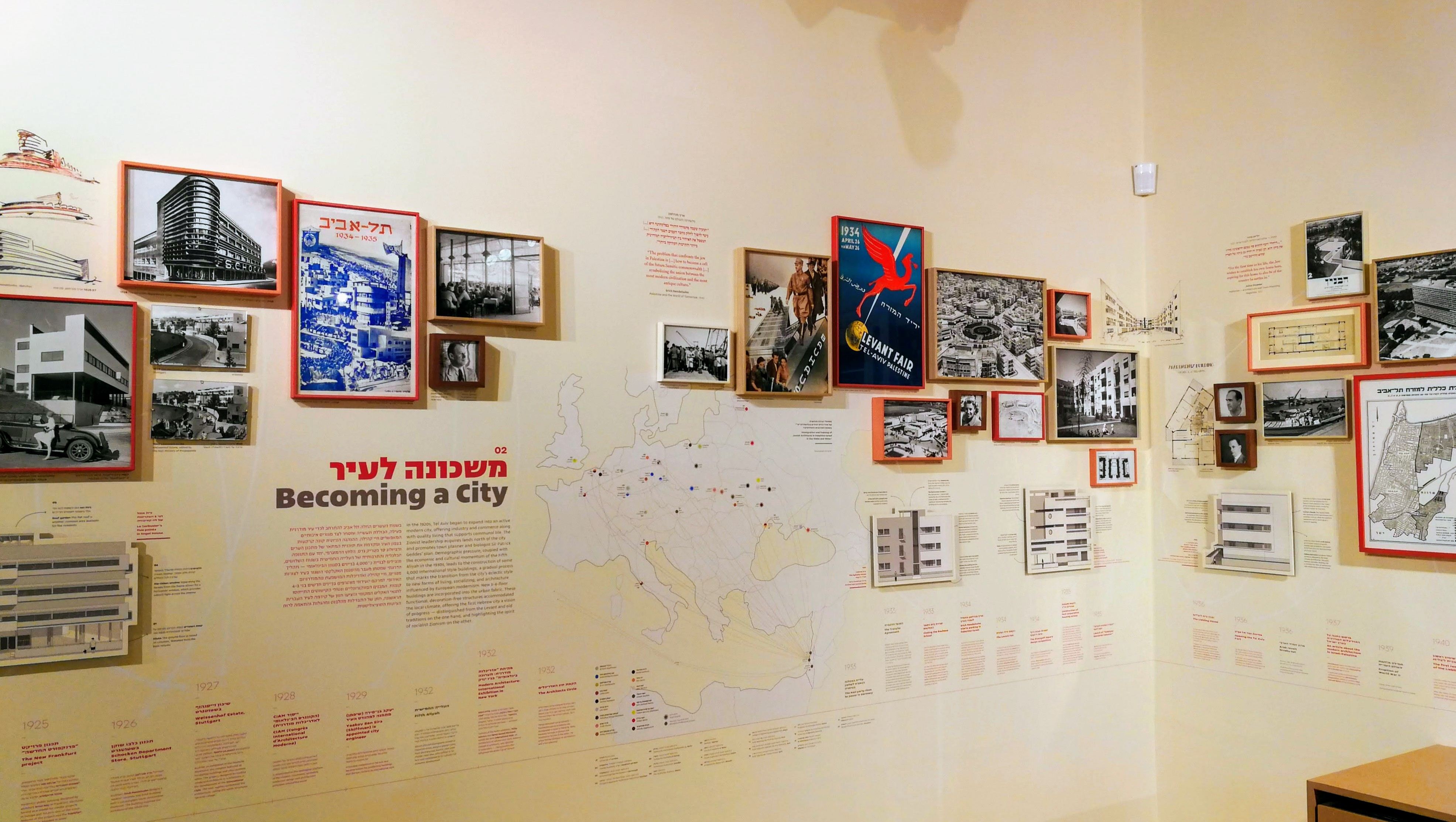 תערוכה המוצגת על הקירות בבית מקס ליבלינג, מרכז העיר הלבנה, בניין מודרניסטי בסגנון באוהאוס בעל משמעות אדריכלית. הבית ממוקם ברחוב אידלסון 29, תל אביב. תוכנן על ידי האדריכל דב כרמי ונבנה בשנת 1936.